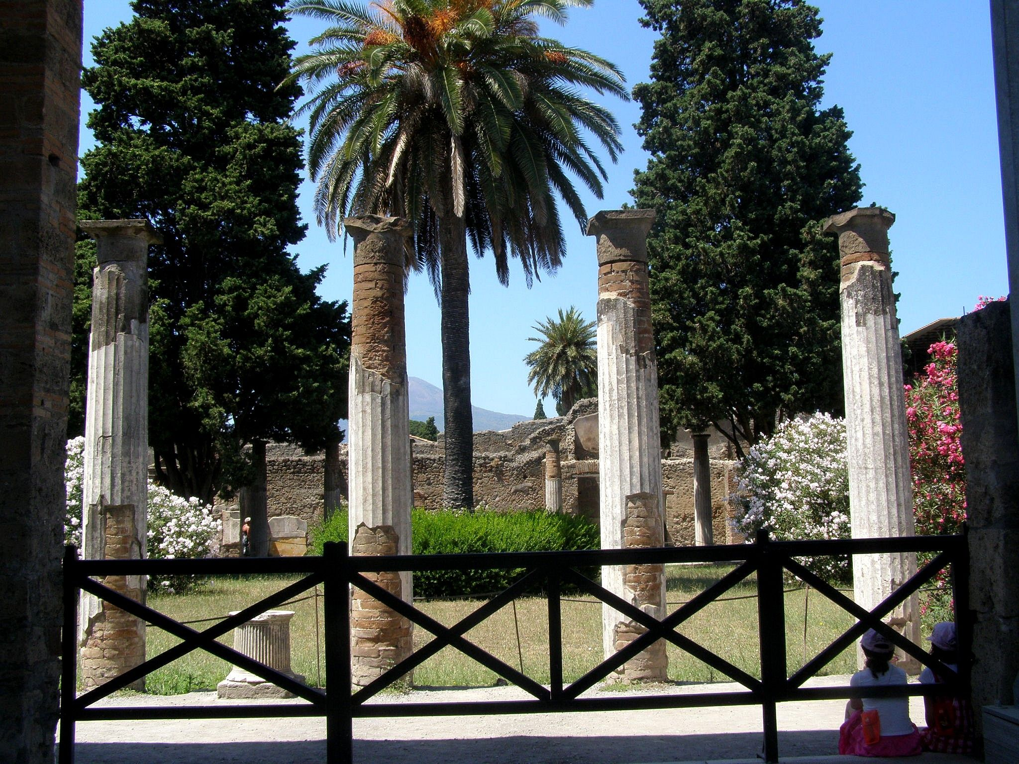 Pohľad do záhrady Faunovho domu s peristylom